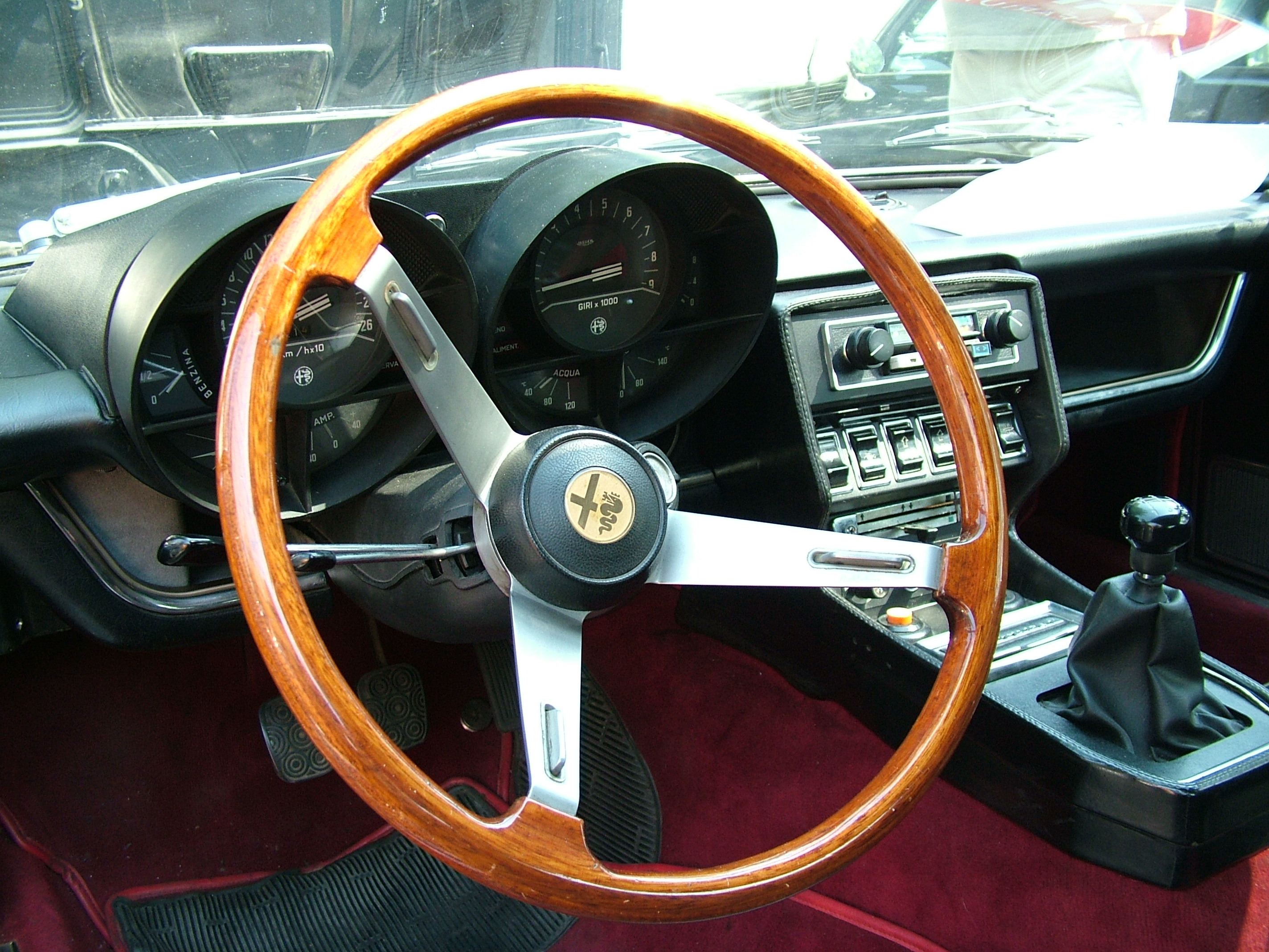 A visitor's Alfa Romeo Montreal - cockpit